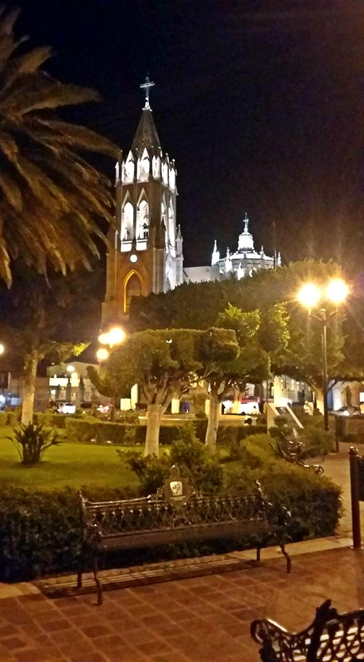 Moroleón